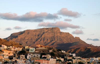 Monte Verde - det Gröna Berget är faktiskt brunt och torrt men i toppen finns det gott om växter pga den höga fuktigheten. Bilden tagen av Henryk Kotowski i november 2005.